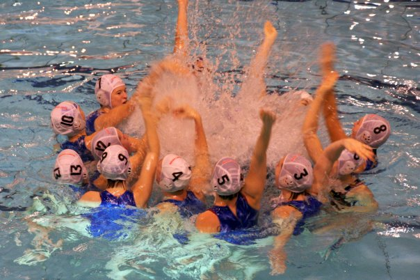 L'équipe du SDUS waterpolo dans la piscine